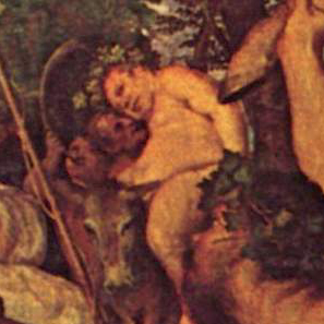 Dettaglio dal dipinto di Tiziano